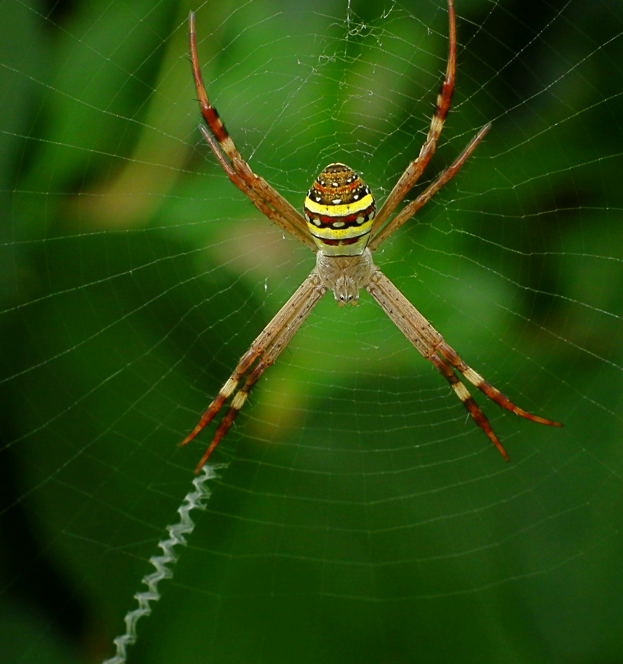 Family Araneidae